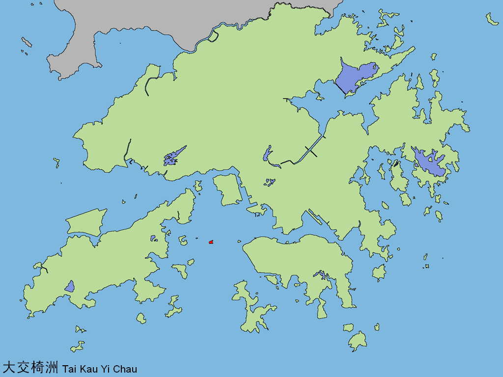 中文（香港）: 大交椅洲。